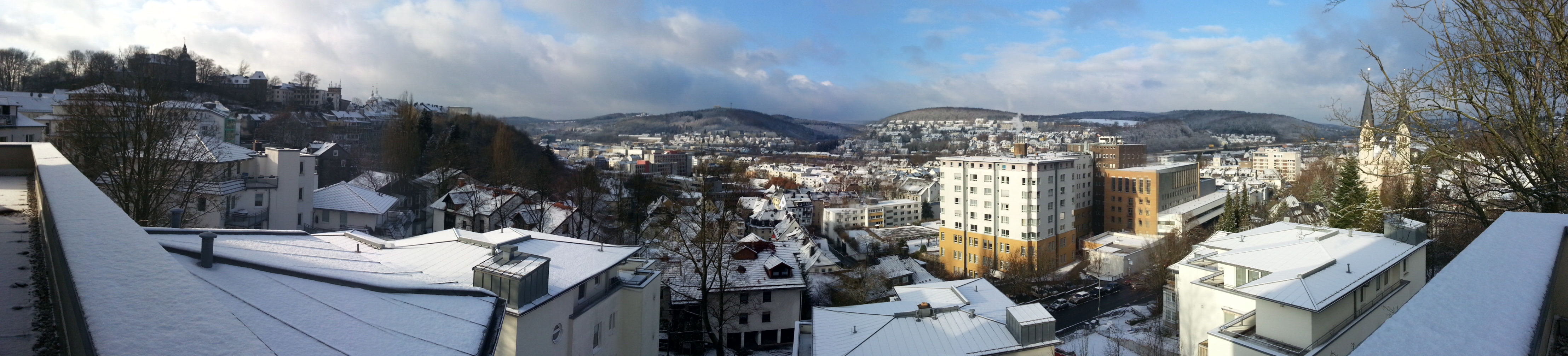 Blick auf Siegen vom Balkon der Villa Waldrich mit Oberem Schloss (links), Marienkrankenhaus und HTS (mittig) und St. Michaelskirche (rechts).